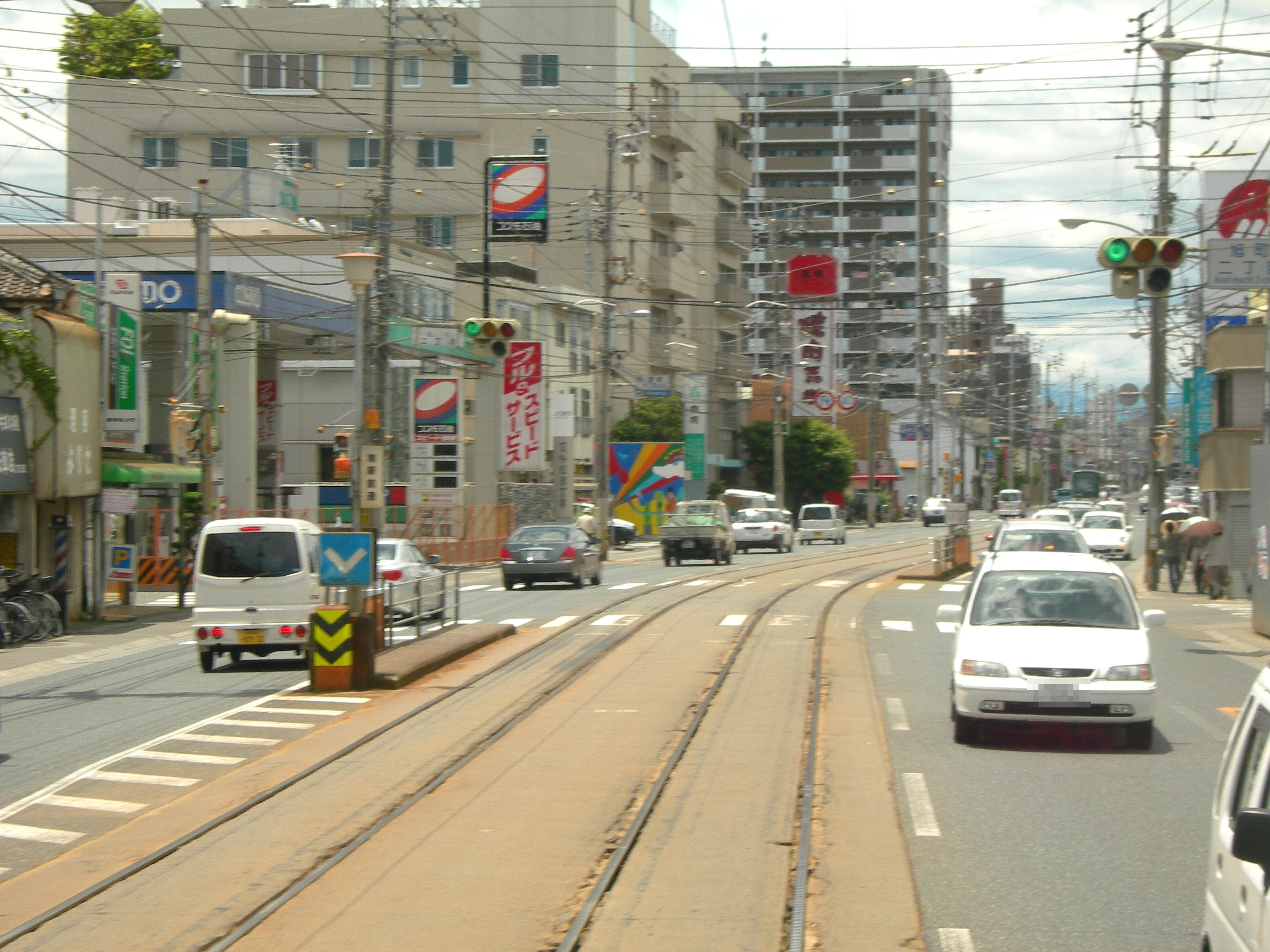 土佐電気鉄道・旭駅前通電停付近